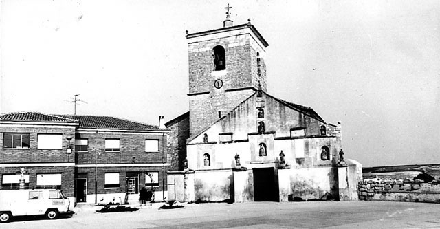 Iglesia de la Asunción - Cogeces del Monte (Valladolid) - Fotografía. Papel 118 x 61 B/N